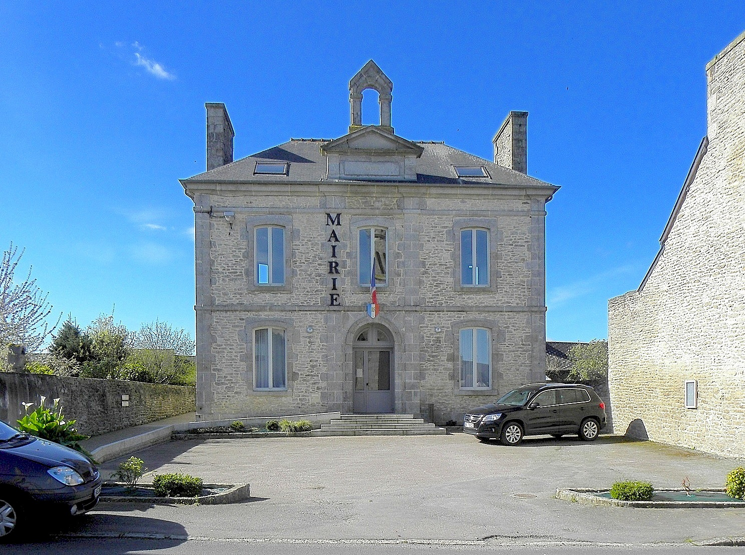 Mairie de Brusvily (22).